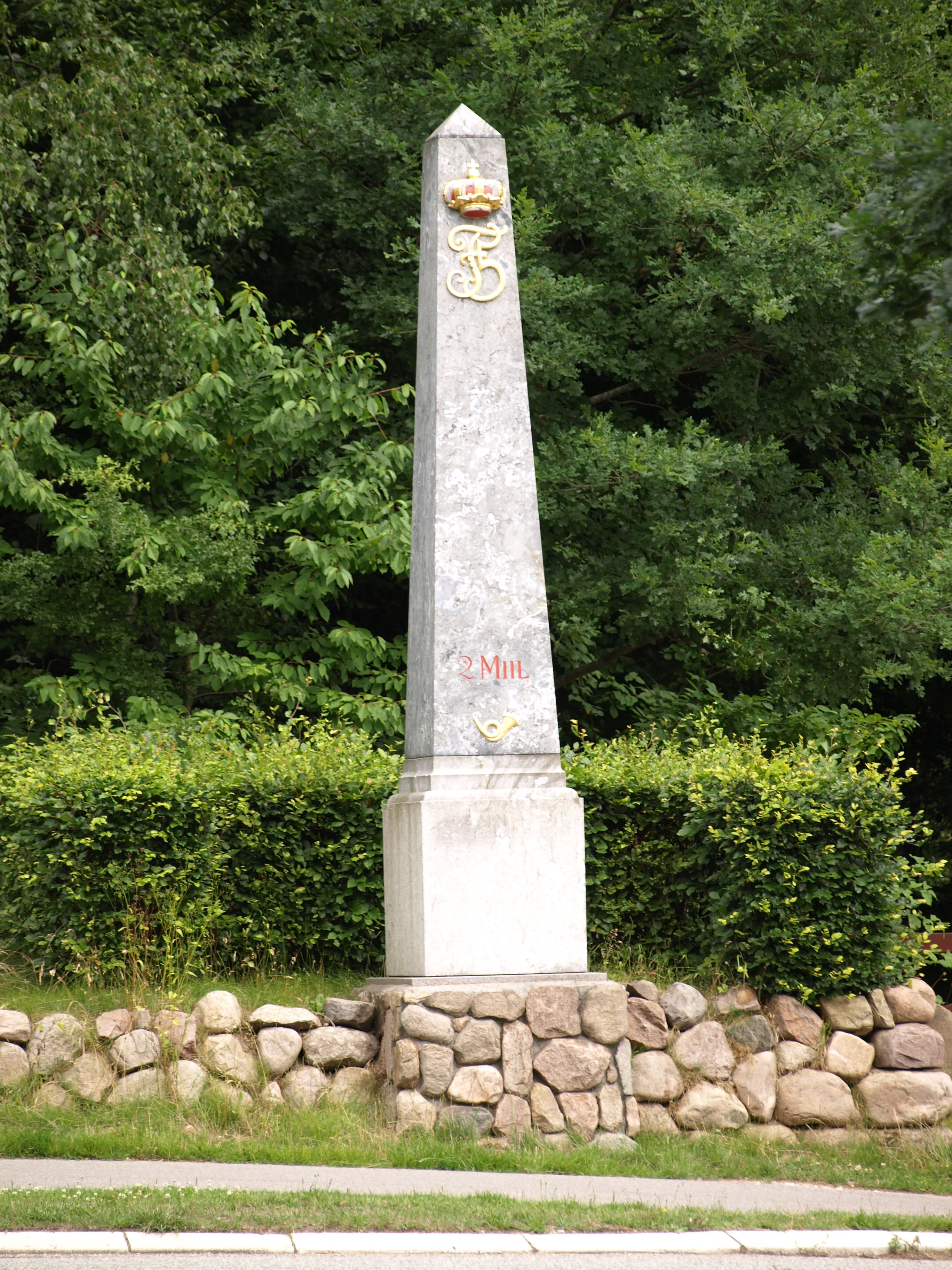 Milepæl af norsk marmor på Geels Bakke. Indskriften lyder: F5 2 Miil. Af typen S.B. Restaureret i 2008.